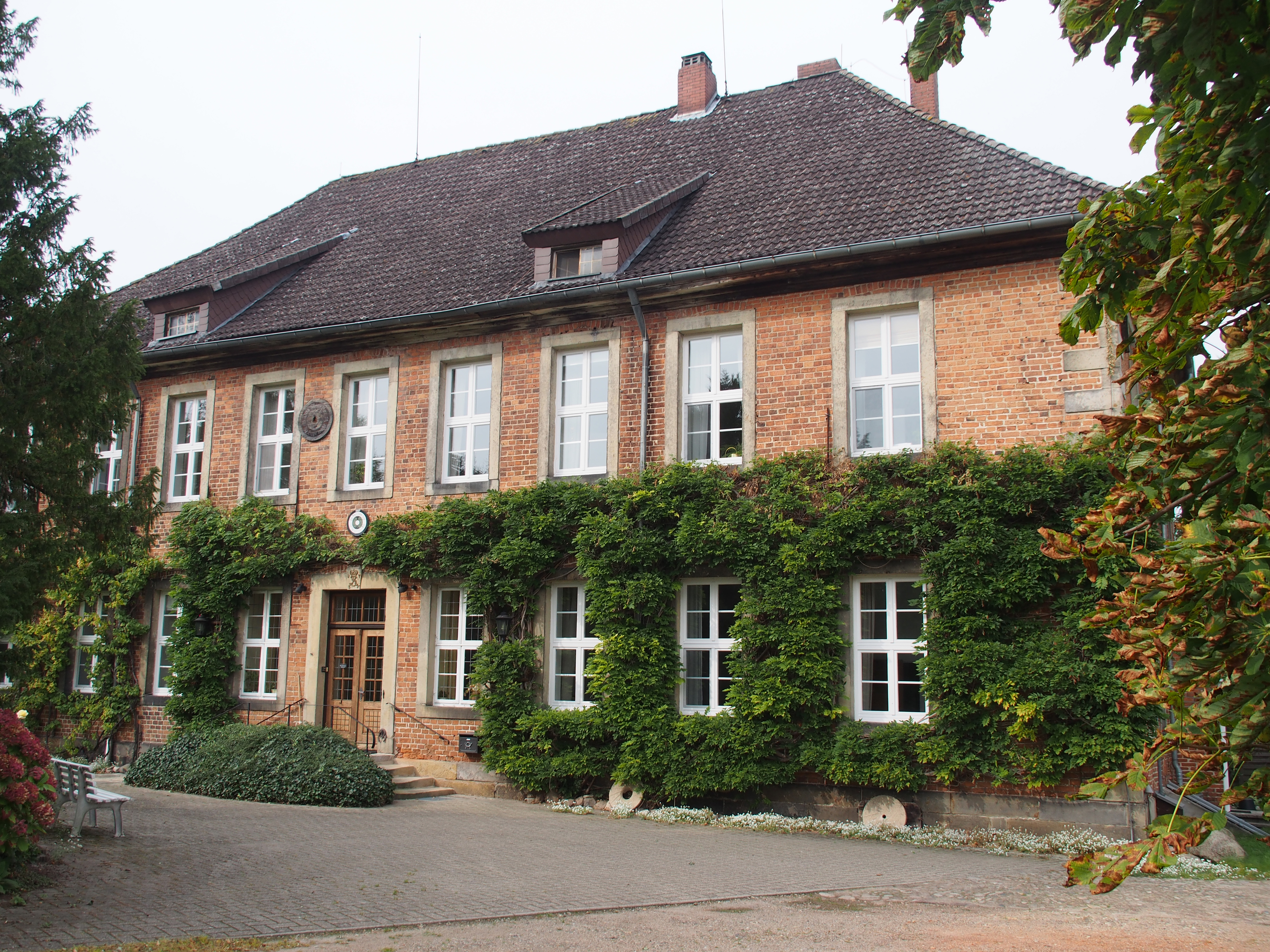 Amtshaus von 1735 in Beedenbostel, Niedersachsen (Germany)